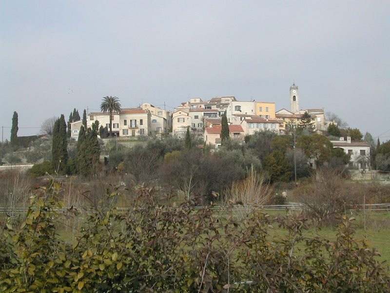 quartier de Grasse